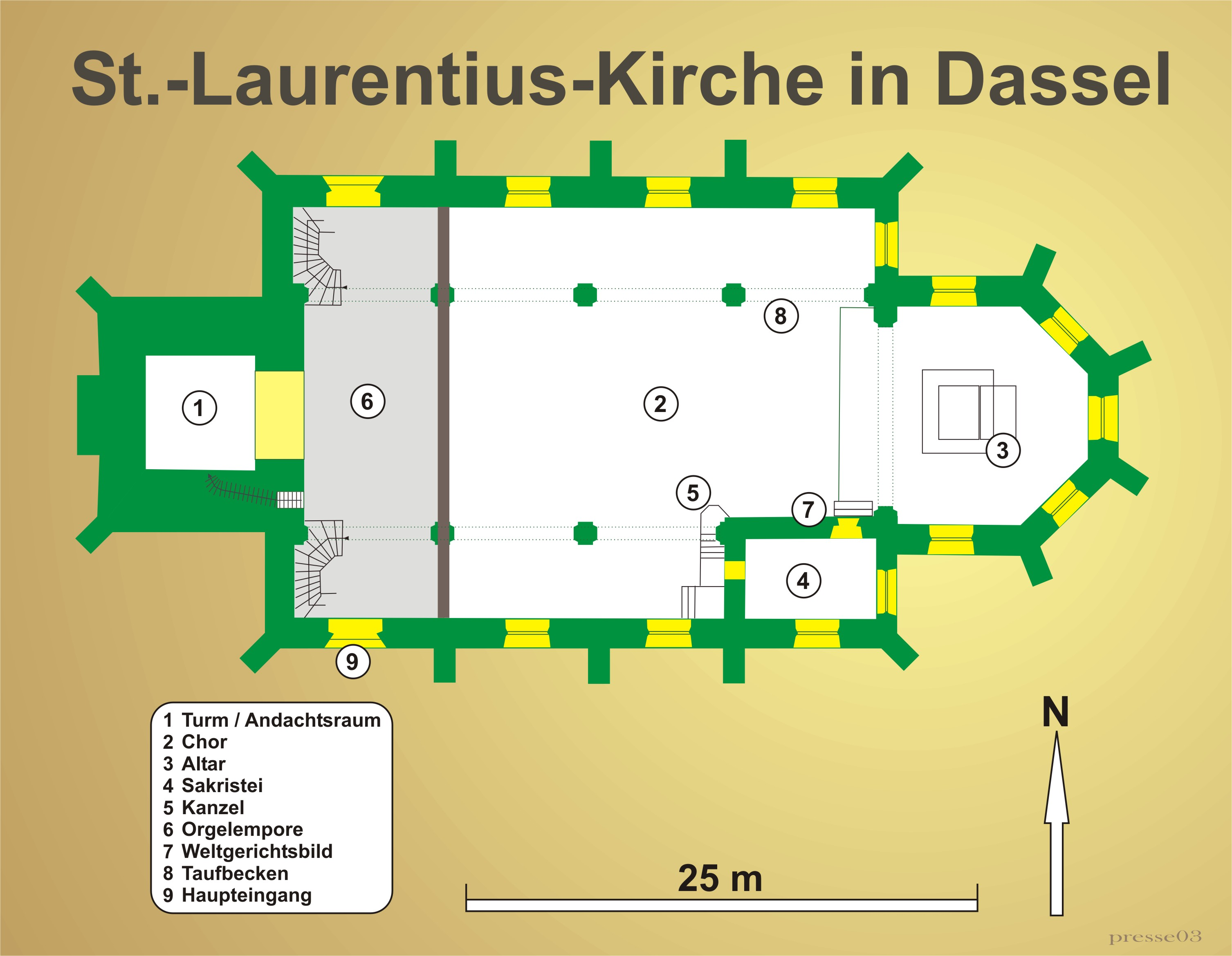 Evangelische Kirche St. Laurentius in Dassel, Niedersachsen, Deutschland - Grundrissplan